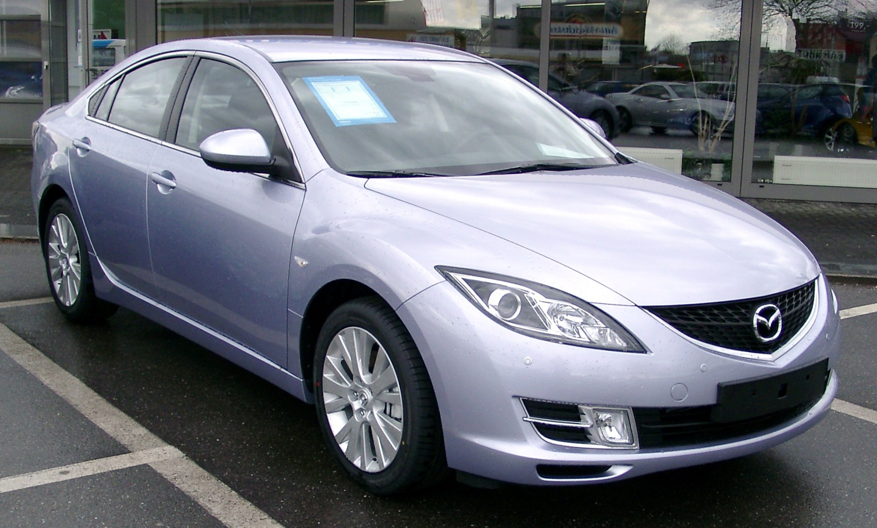 Mazda 6, 2. Generation